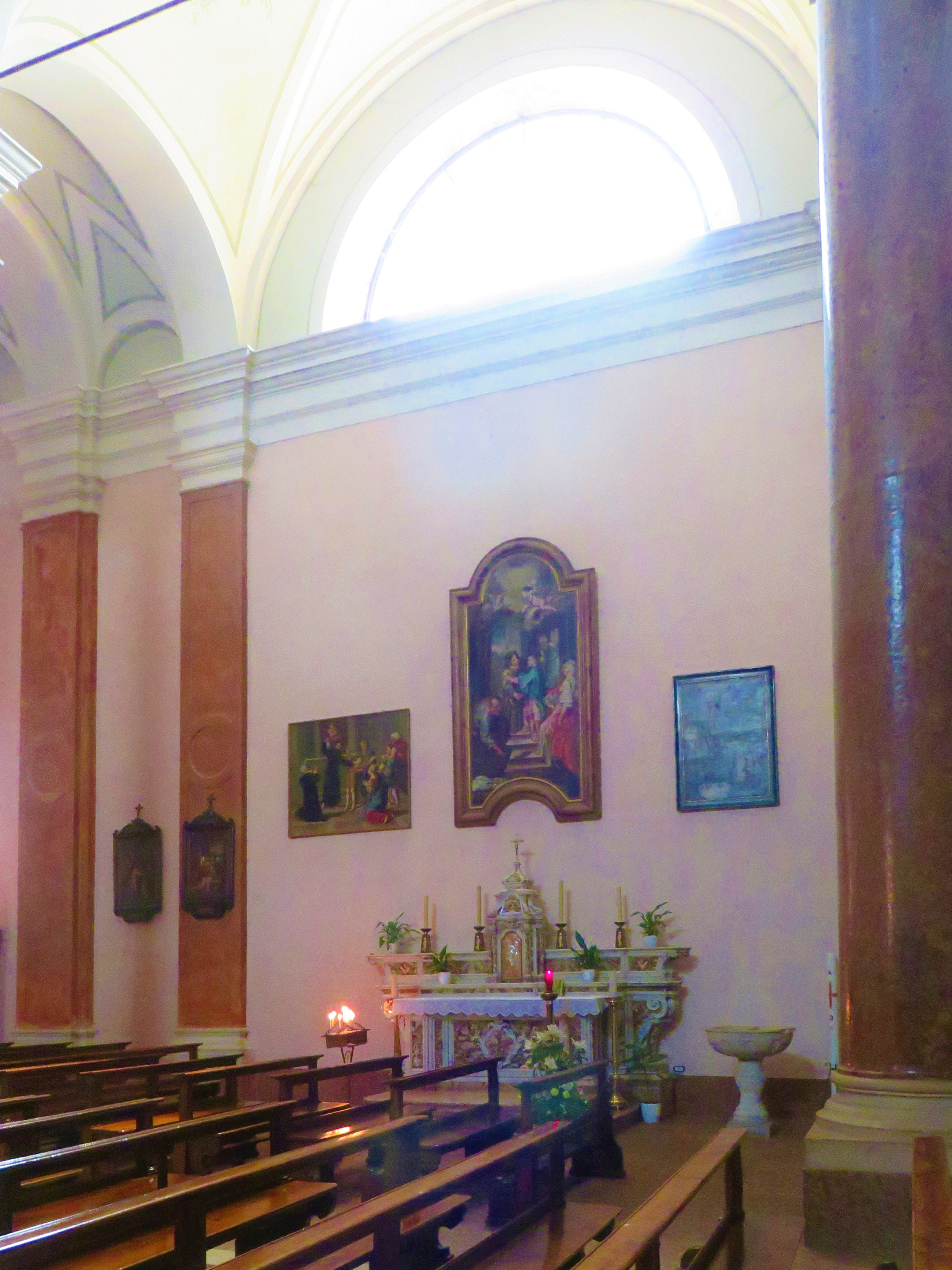 Chiesa della Visitazione di Maria Santissima. Altare maggiore della vecchia chiesa, opera di Giovanni Francesco Ogna. Ora è posizionato nella nuova chiesa, nella navata, sul lato meridionale. Sopra l'altare la pala della Visitazione.